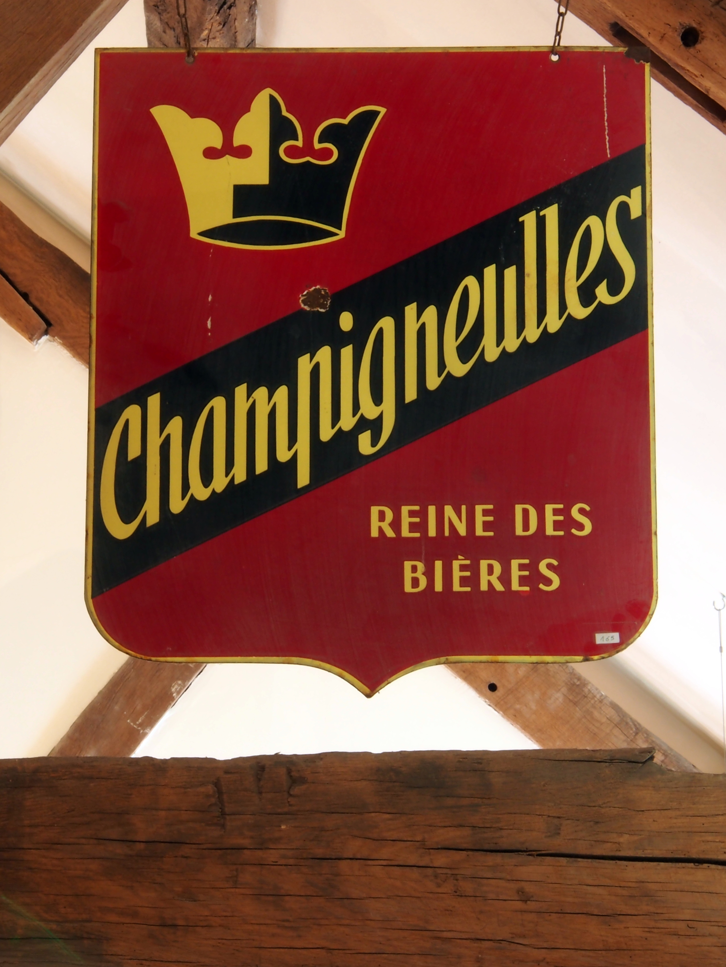 Champigneulles enamel advertising sign.